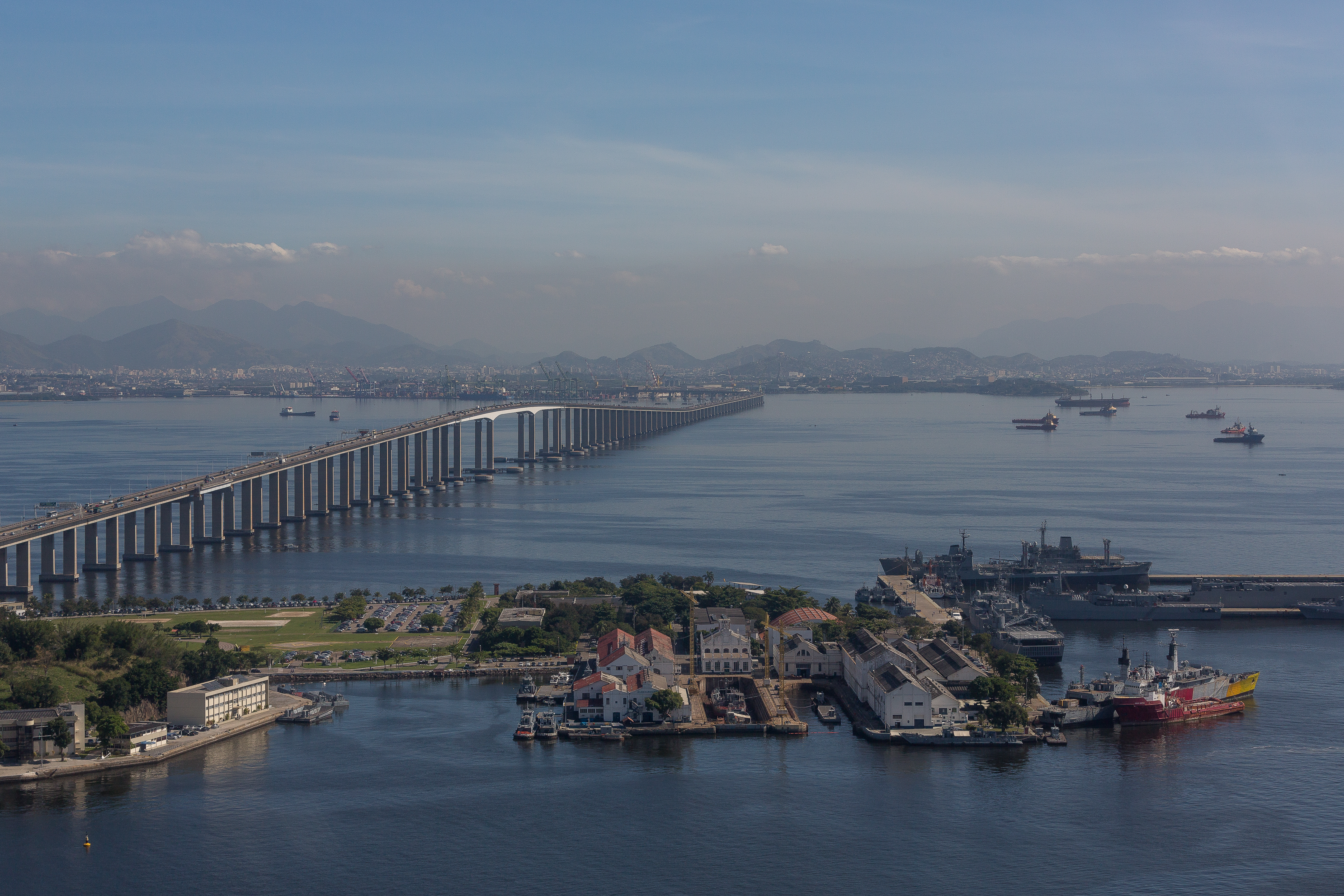 Vista aérea da Base Naval do Rio de Janeiro, localizada na Ilha de Mocanguê e Ilha de Mocanguê Grande, Niterói - RJ - Brasil.